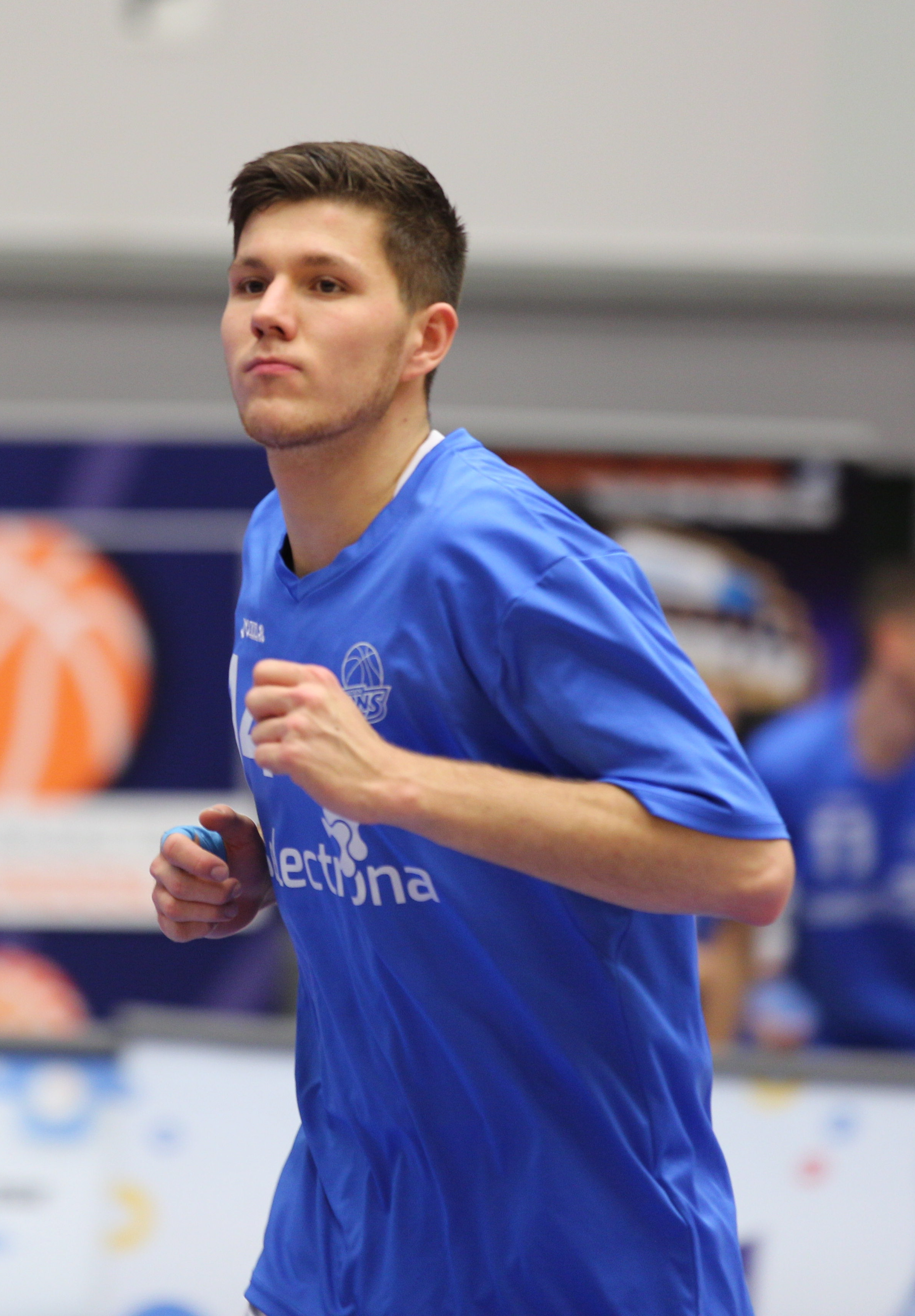 Max von der Wippel, Dresden Titans, Nr. 14